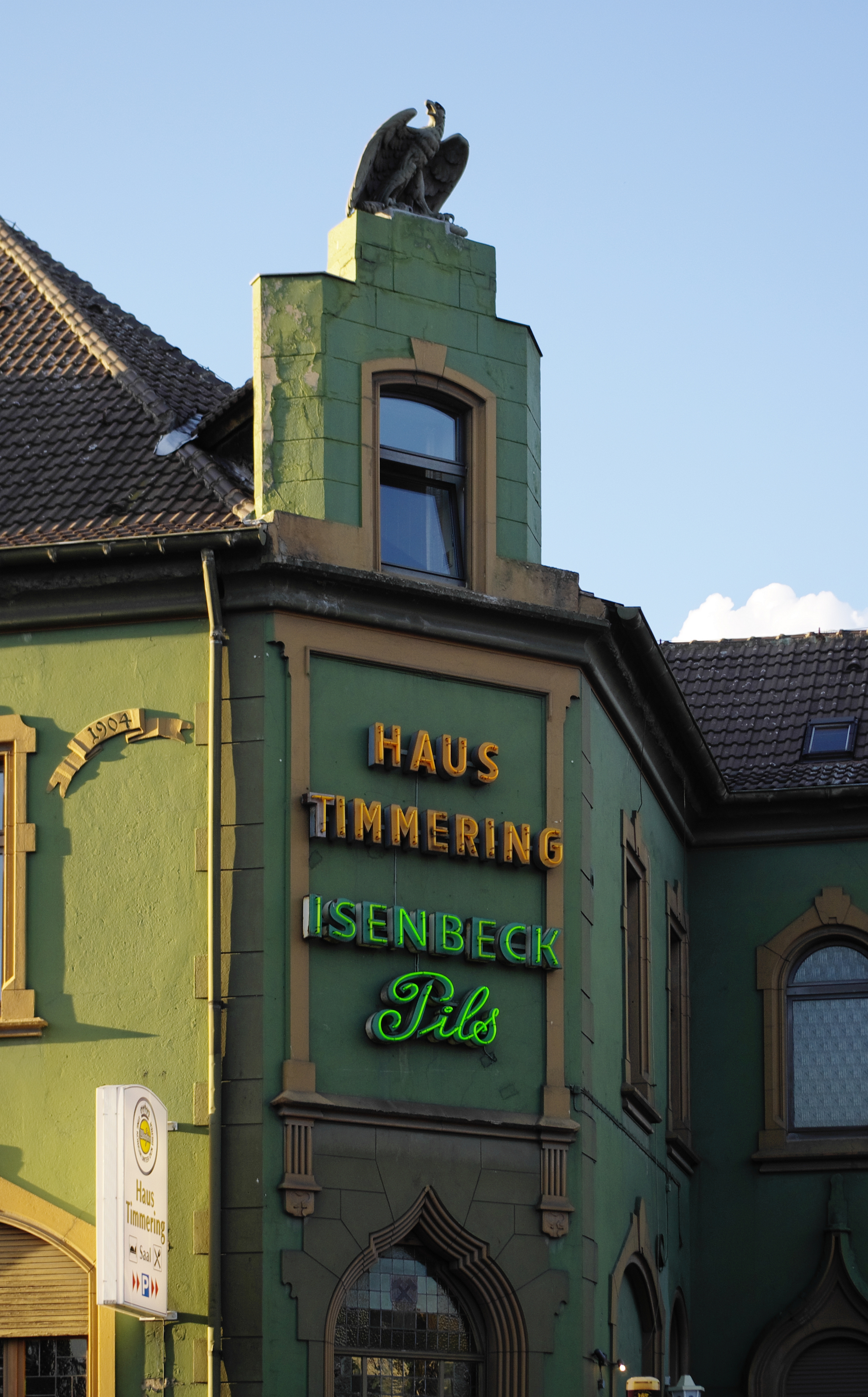 Denkmalgeschütztes Gasthaus "Zum Adler", heute "Timmering" in Bönen, Nordrhein-Westfalen. Denkmalnummer 11 der Denkmalschutzliste Bönen.